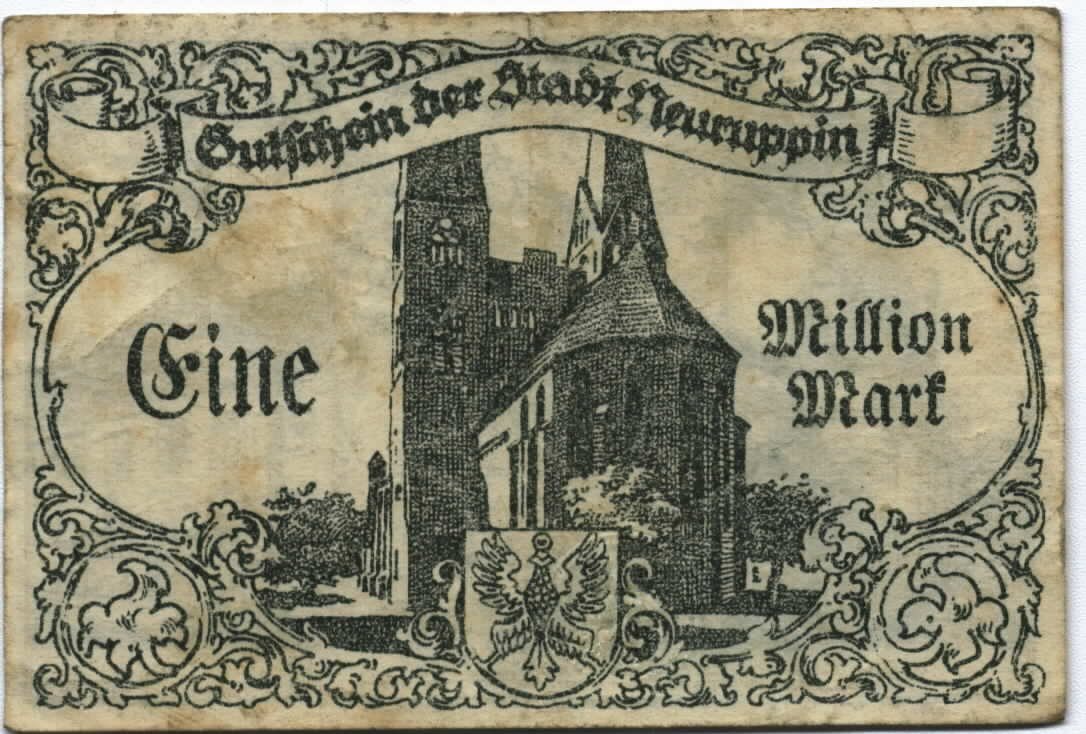 Vorderseite eines Notgeldscheins der Stadt Neuruppin, Wert "1 Million Mark" aus dem Jahr 1923 mit Darstellung der Klosterkirche.